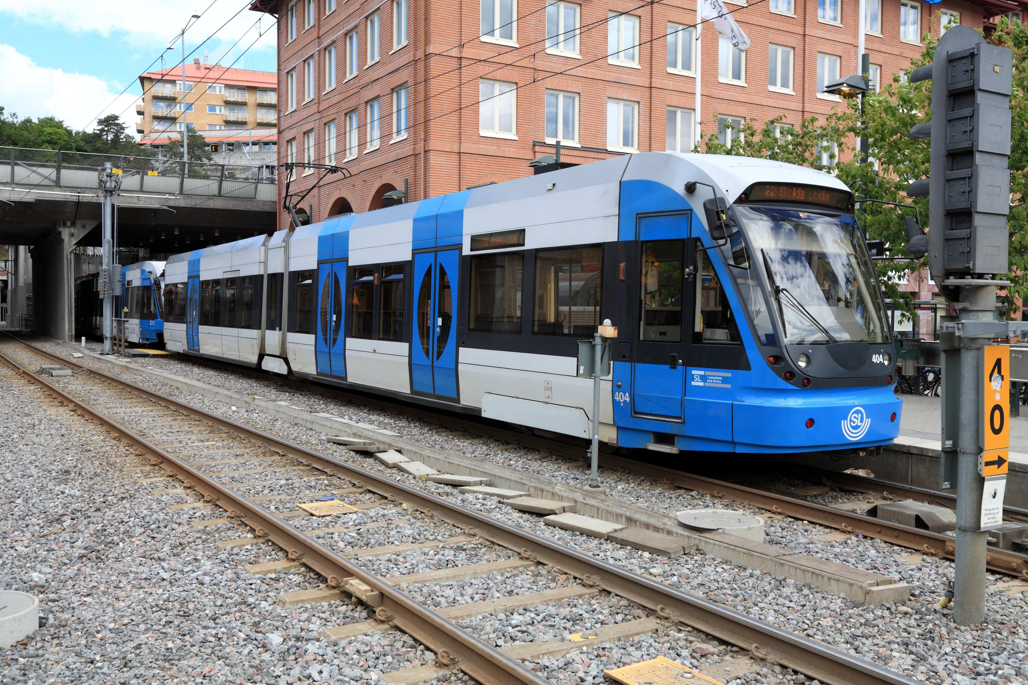 A32-Gelenkwagen am Bahnsteig Richtung Solna Centrum. Noch enden die Züge hier, die Erweiterung steht nach Solna steht vor der Inbetriebnahme. Nicht klar ist, warum die Züge generell über das linke Gleis in die Kehranlage (im Bw Bromma?) verkehren und auch über das linke Gleis in Richtung Sickla Udde von dort zurückkehren.